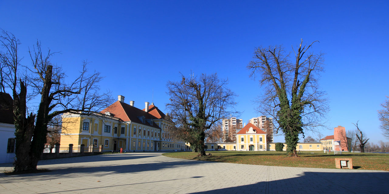 Kompleks vlastelinstva Eltz, Županijska 1, 2, 3, 4, 5 i 7, Gradski muzej Vukovar